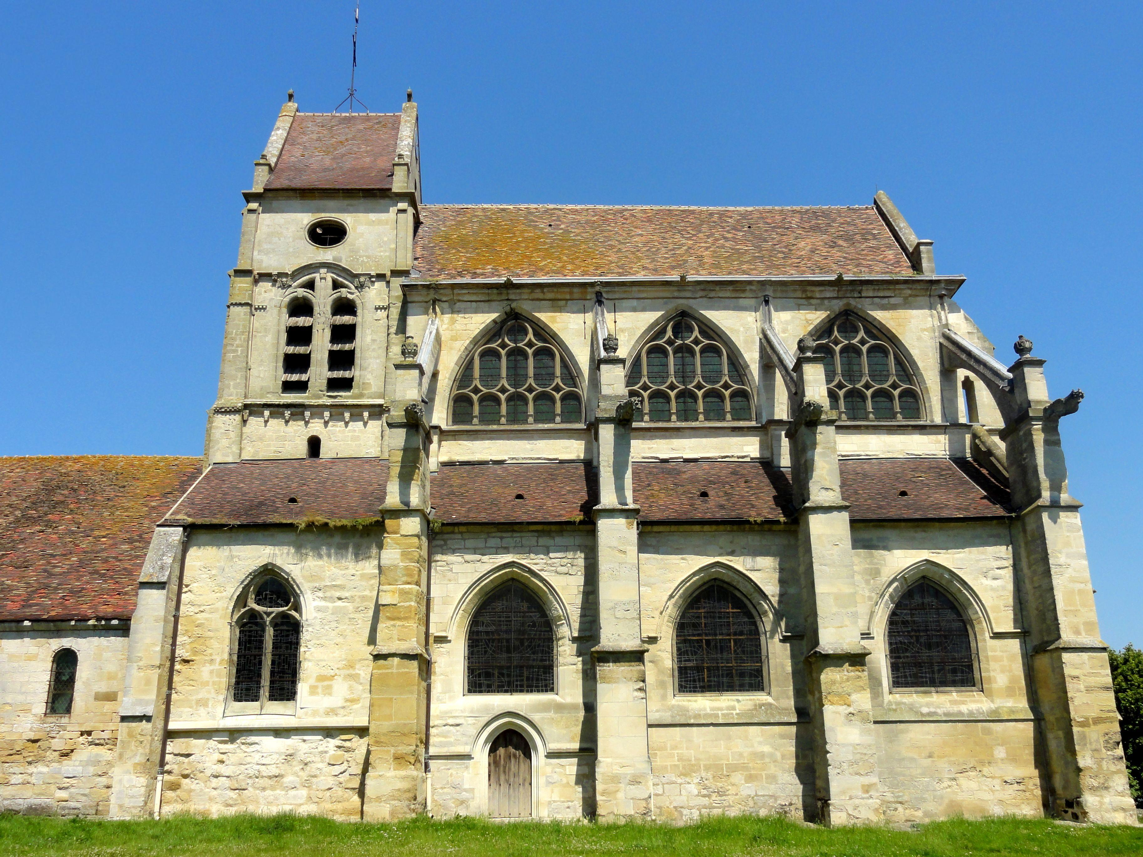 Elévation sud.